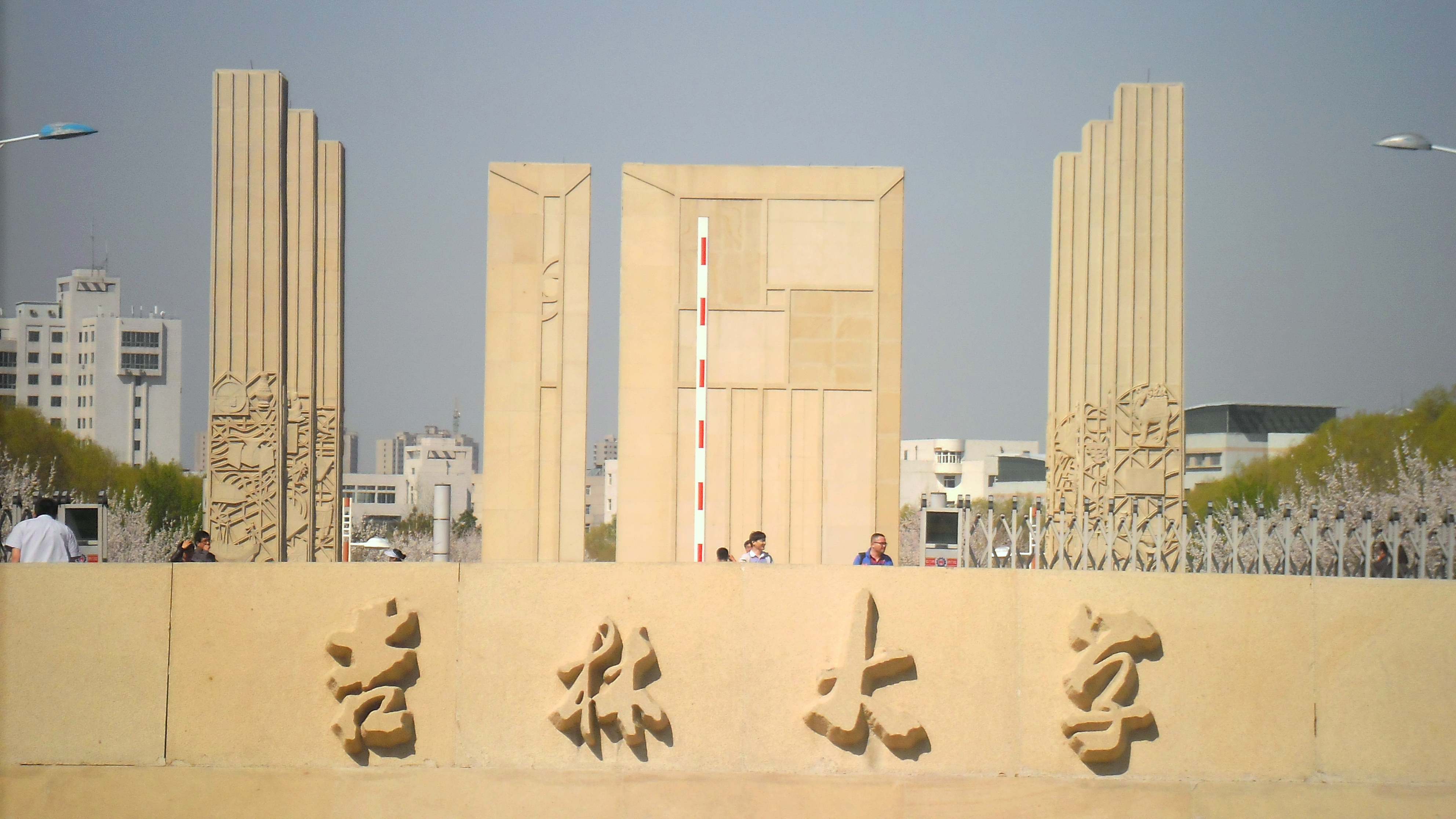 中文（中国大陆）: 吉林大学中心校区